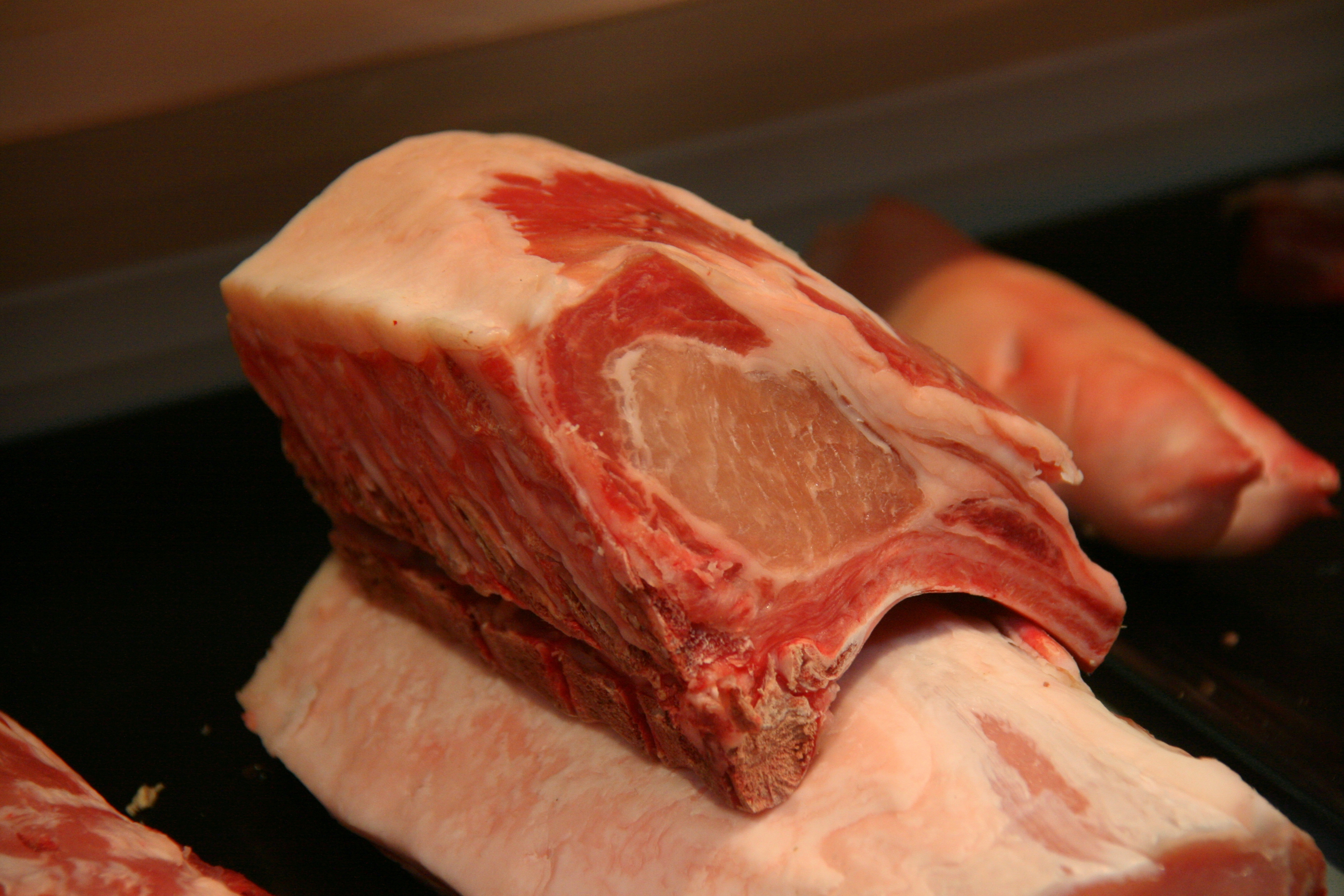 Costillas de Cerdo